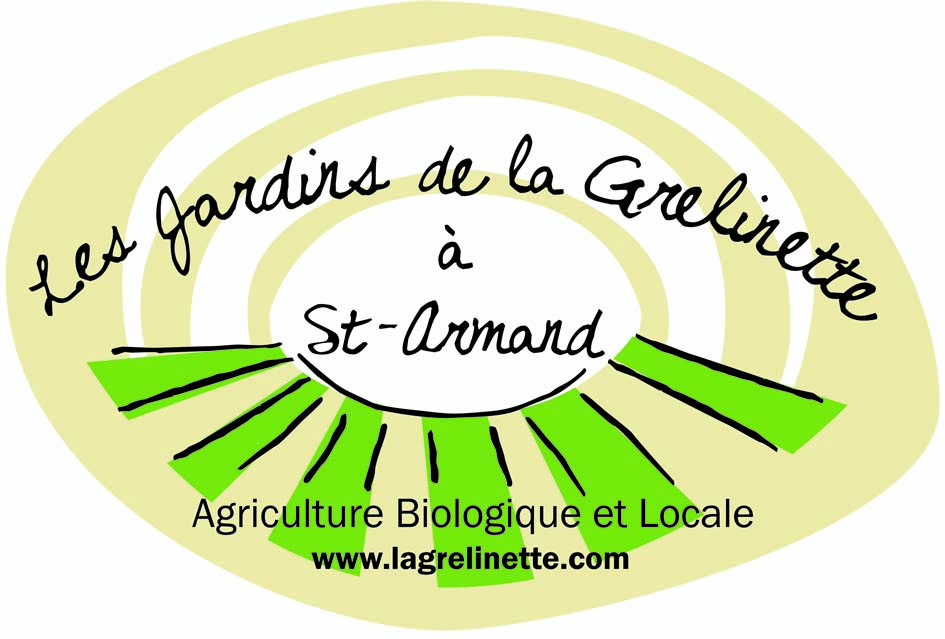 image des Jardins de la Grelinette par Jean-Martin Fortier, une micro-ferme maraîchère situé dans les Cantons de l'Est du Québec